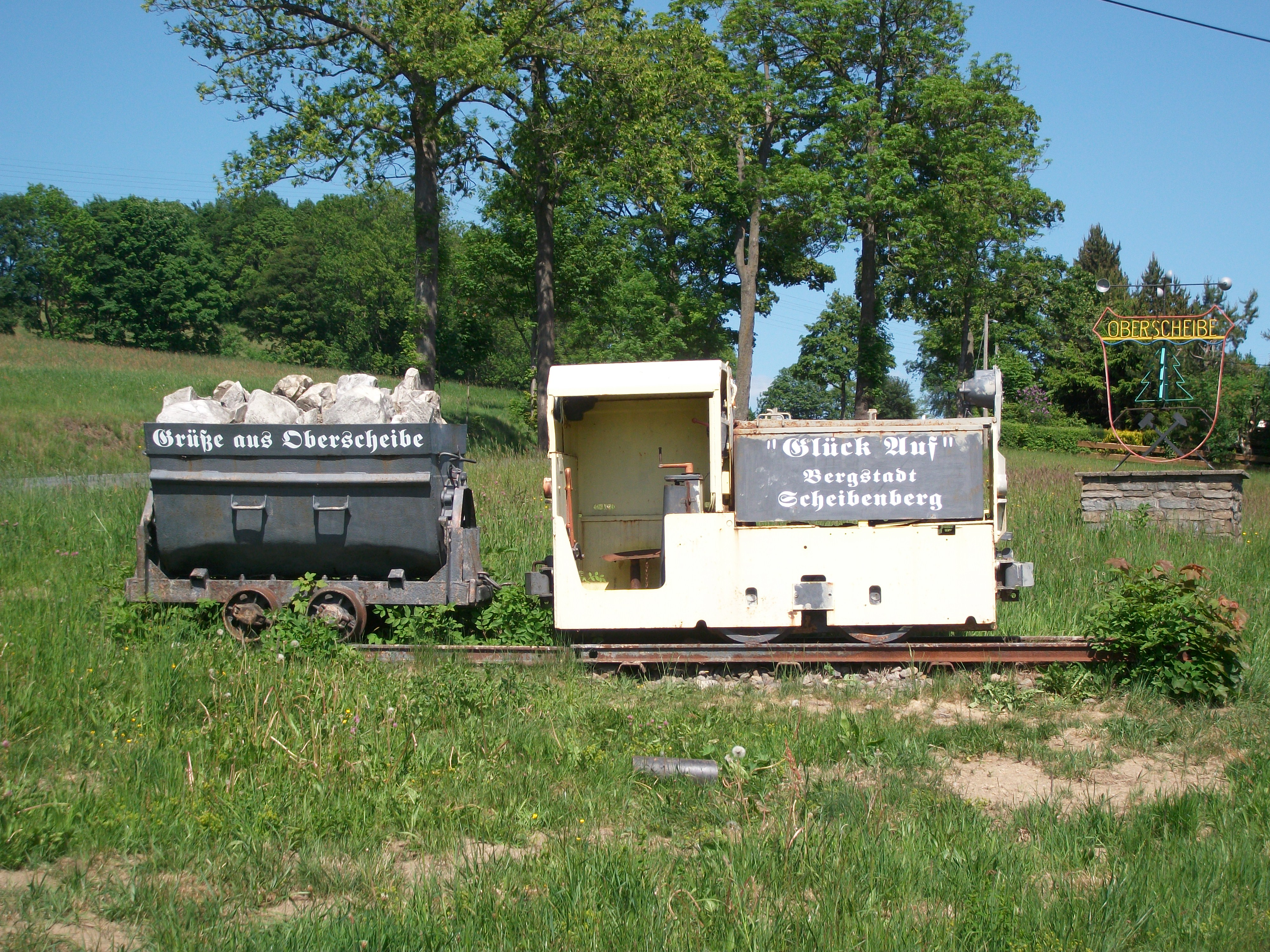 Scheibenberg und Oberscheibe, symbolischer Zug